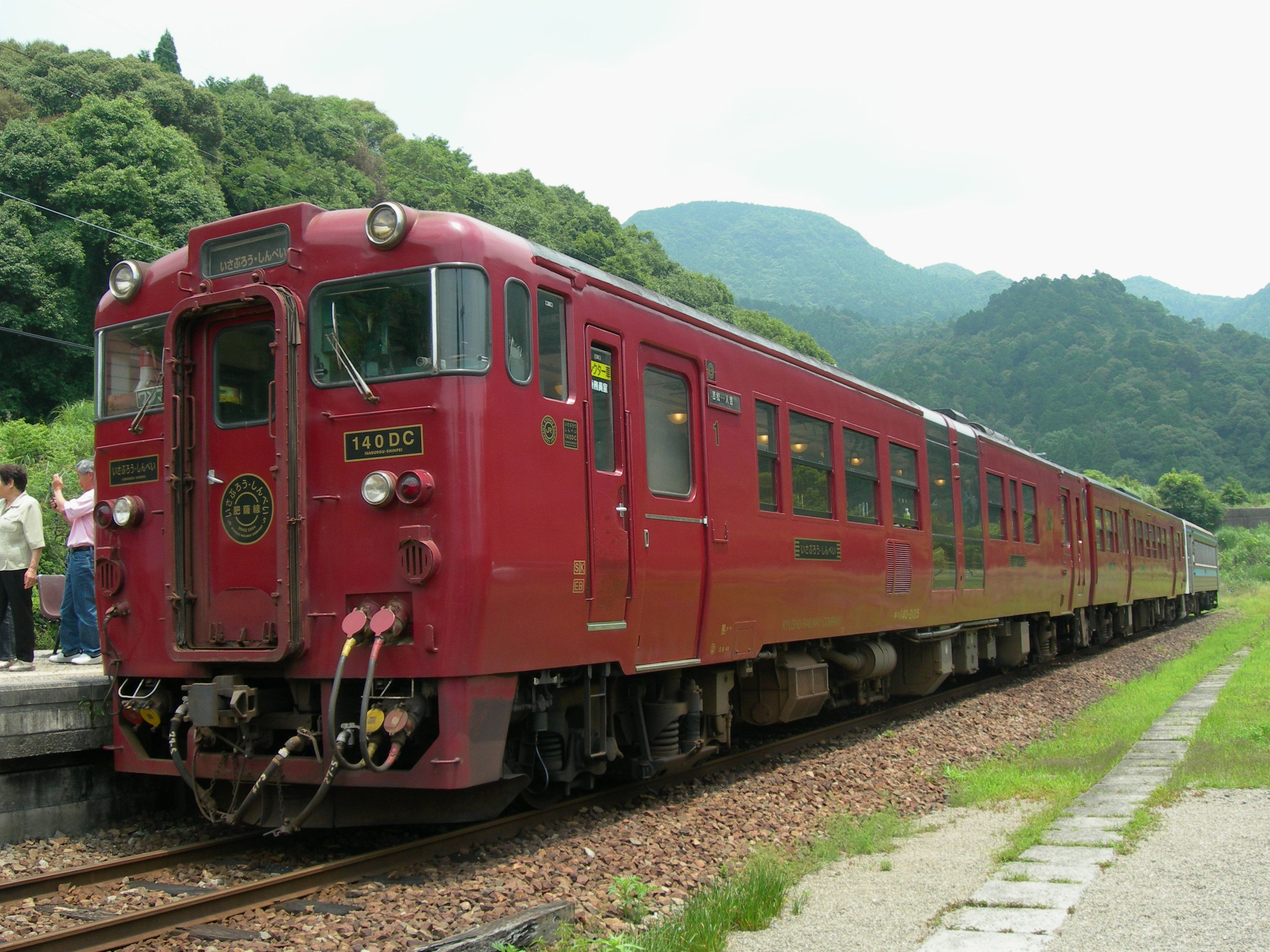 JR九州キハ140系、肥薩線「いさぶろう」「しんぺい」